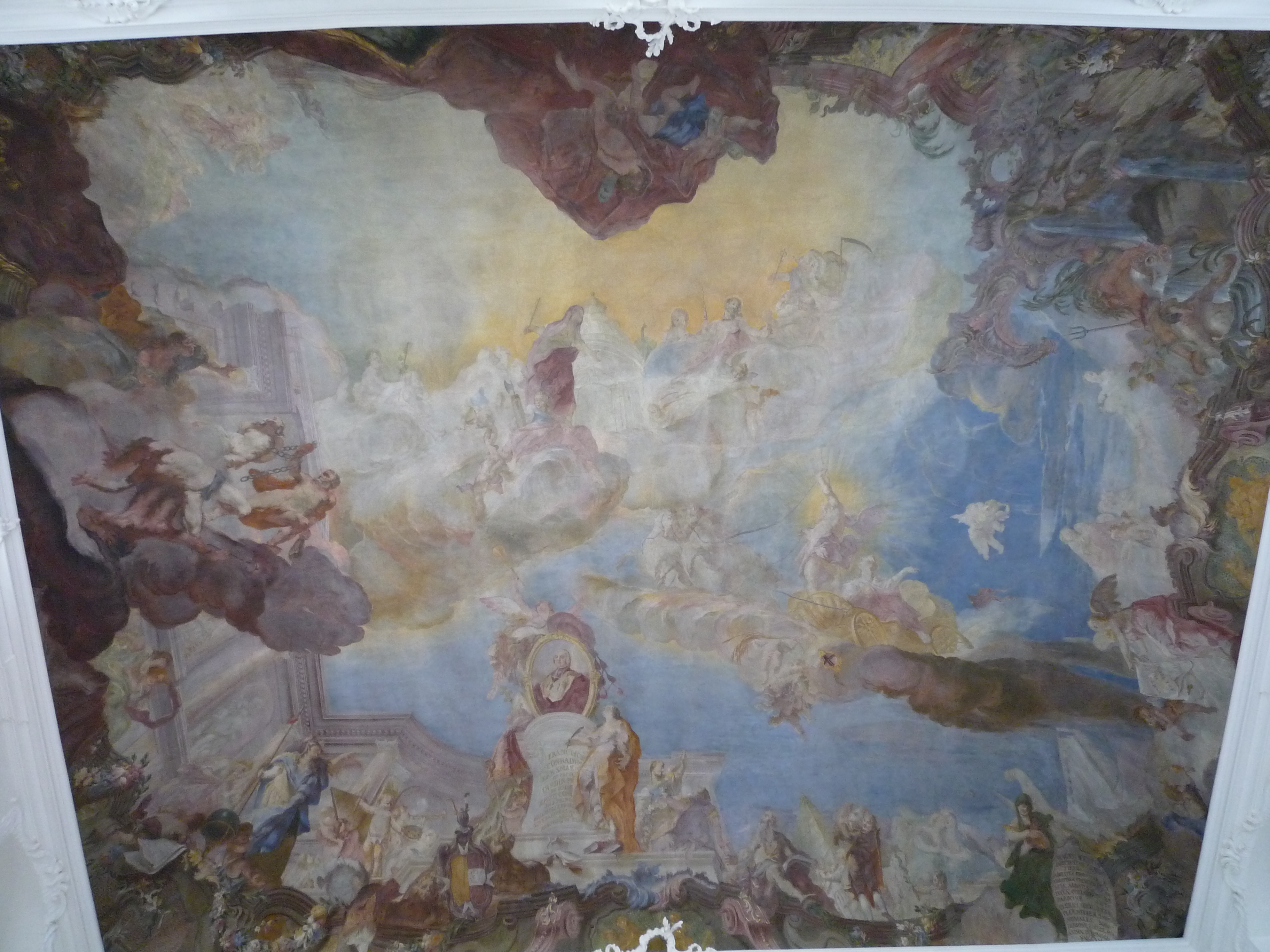 Meersburg, Neues Schloss, Deckenfresko Verherrlichung der fürstbischöflichen Regentschaft (allegorische Verherrlichung des Kardinals Franz Konrad von Rodt), von Joseph Ignaz Appiani, um 1760